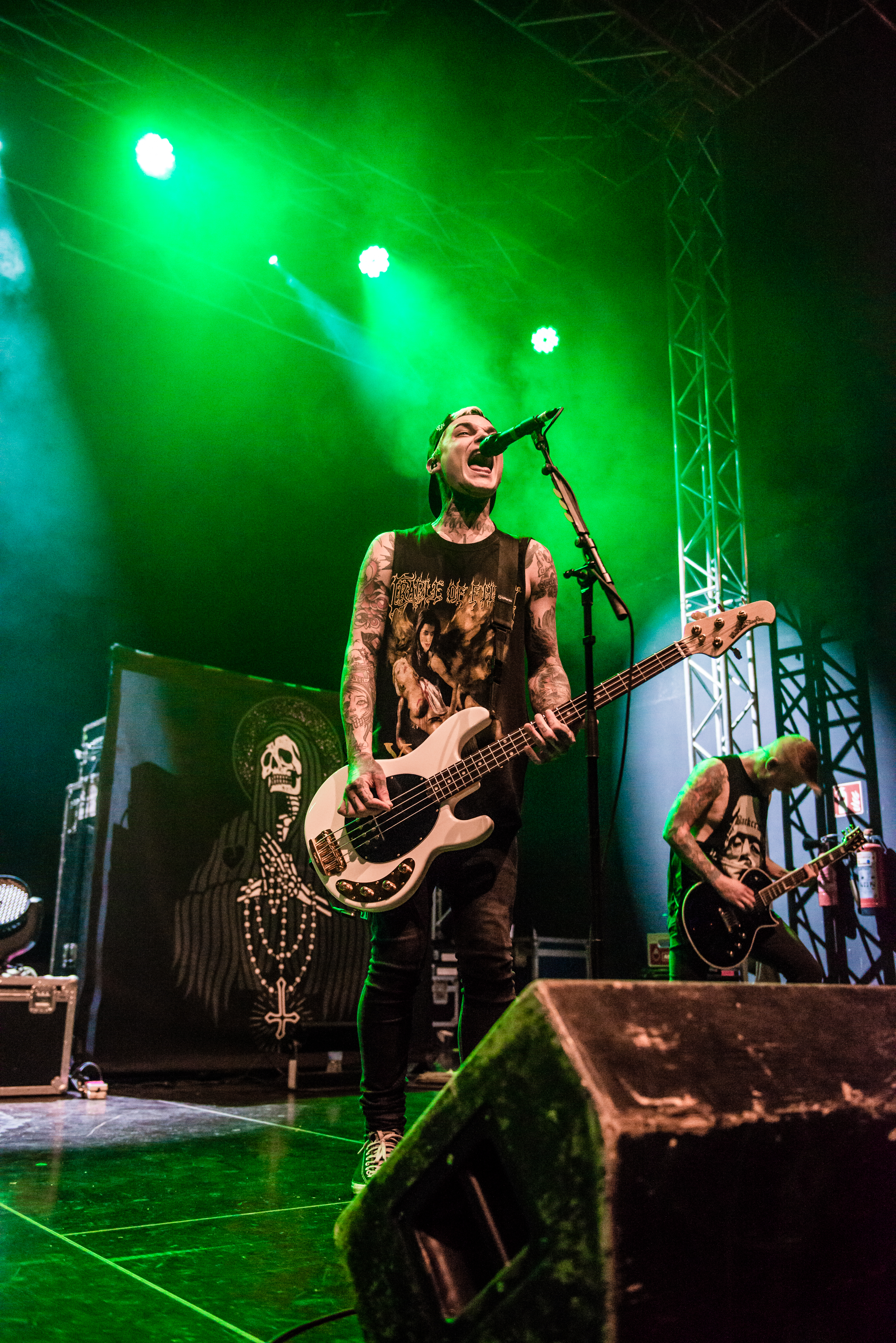 'The Amity Affliction - Impericon Never Say DIE! - Oberhausen'